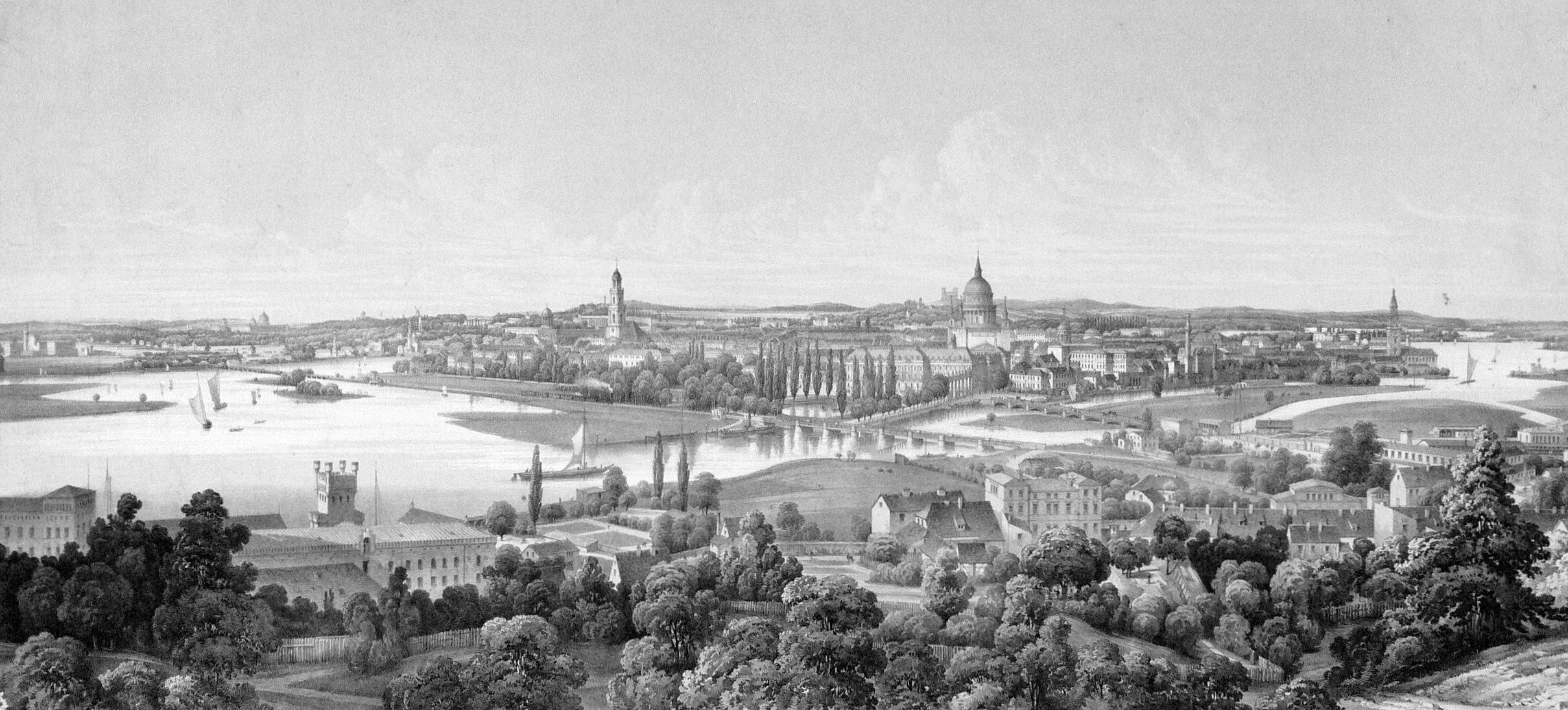 Panorama - Blick über die Havel auf Potsdam mit der Nikolaikirche, den Villen, Kasernen, mit der Langen Brücke und dem Empfangsgebäude der Berlin-Magdeburger Eisenbahn.